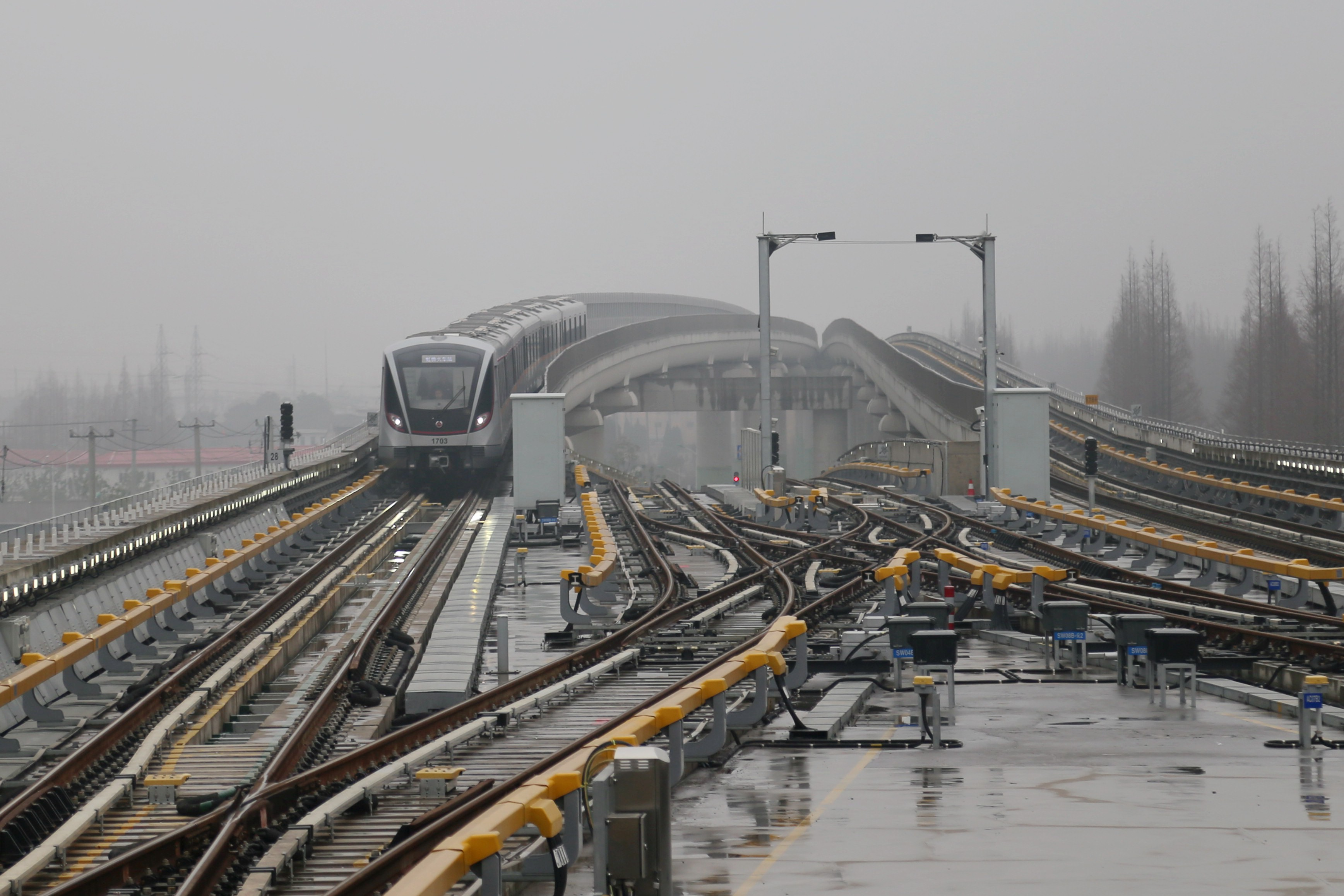 17号线列车正在接近朱家角站